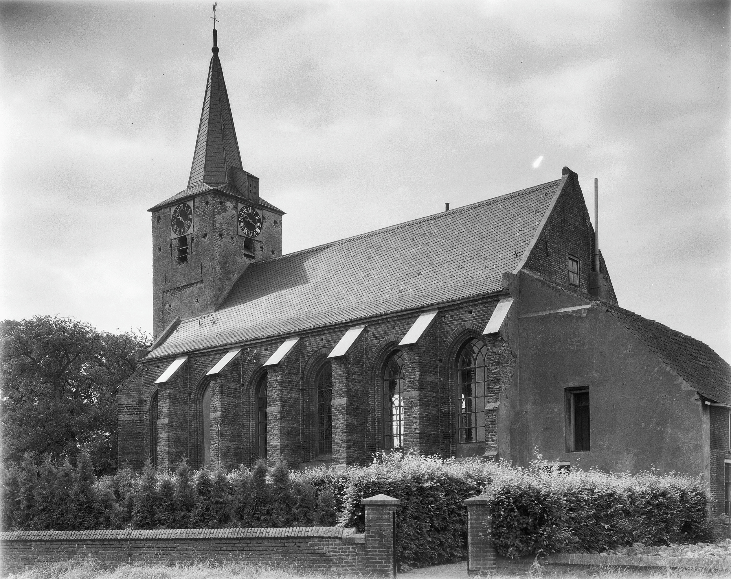 Nederlands Hervormde Kerk: exterieur naar het zuid-oosten, naar het zuid-westen en naar het noord-westen